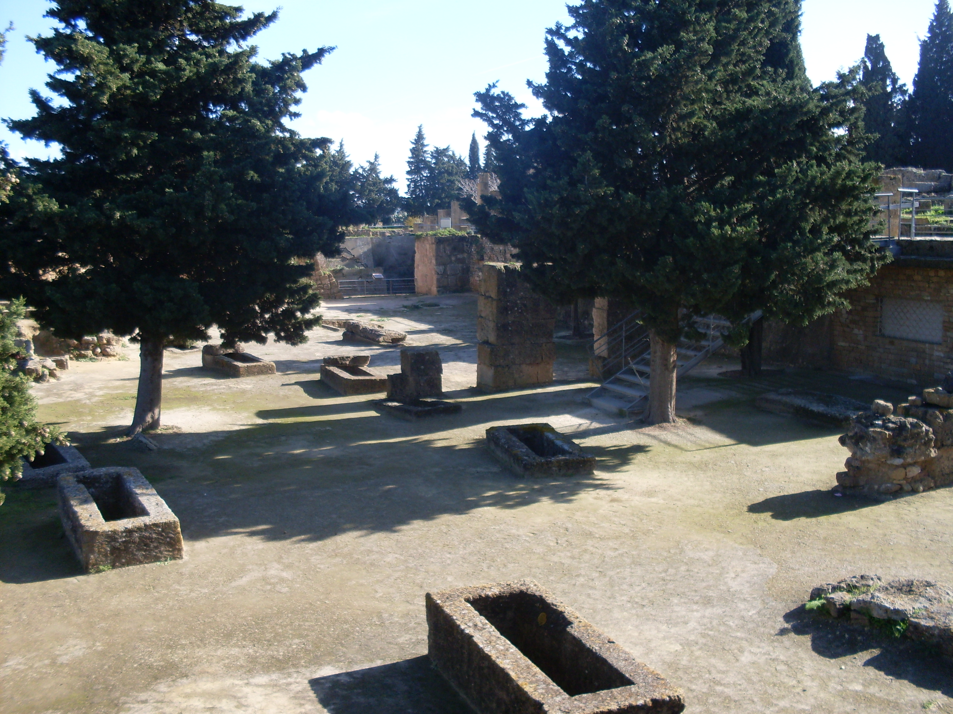 Tunisie, Site Archéologique d'Utique, Nécropole punique